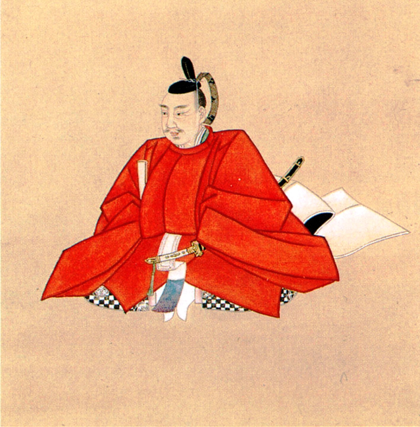 戦国武将・古田織部（重然）の肖像画（部分）